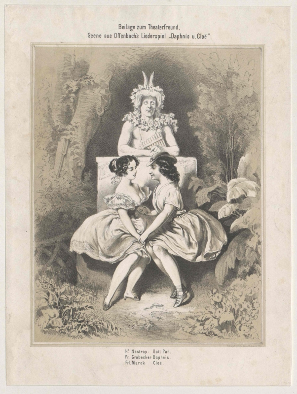 Szene aus Offenbachs Singspiel "Daphnis und Chloe", Nestroy als Gott Pan. Anna Grobecker als Daphnis und Anna Marek als Chloe. Theater am Franz-Josef-Kai 1861